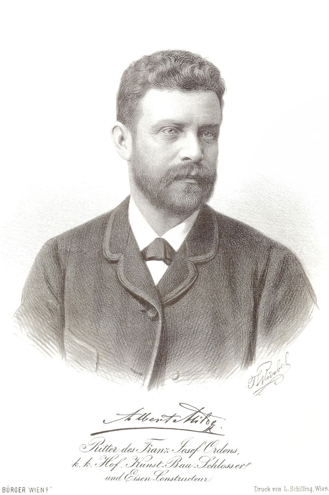 Albert Milde (1839-1904). Ritter des Franz Josef-Ordens, k.k. Hof, Kunst-Bau-Schlosser und Eisen-Constructeur. Druck von L. Schilling, Wien.